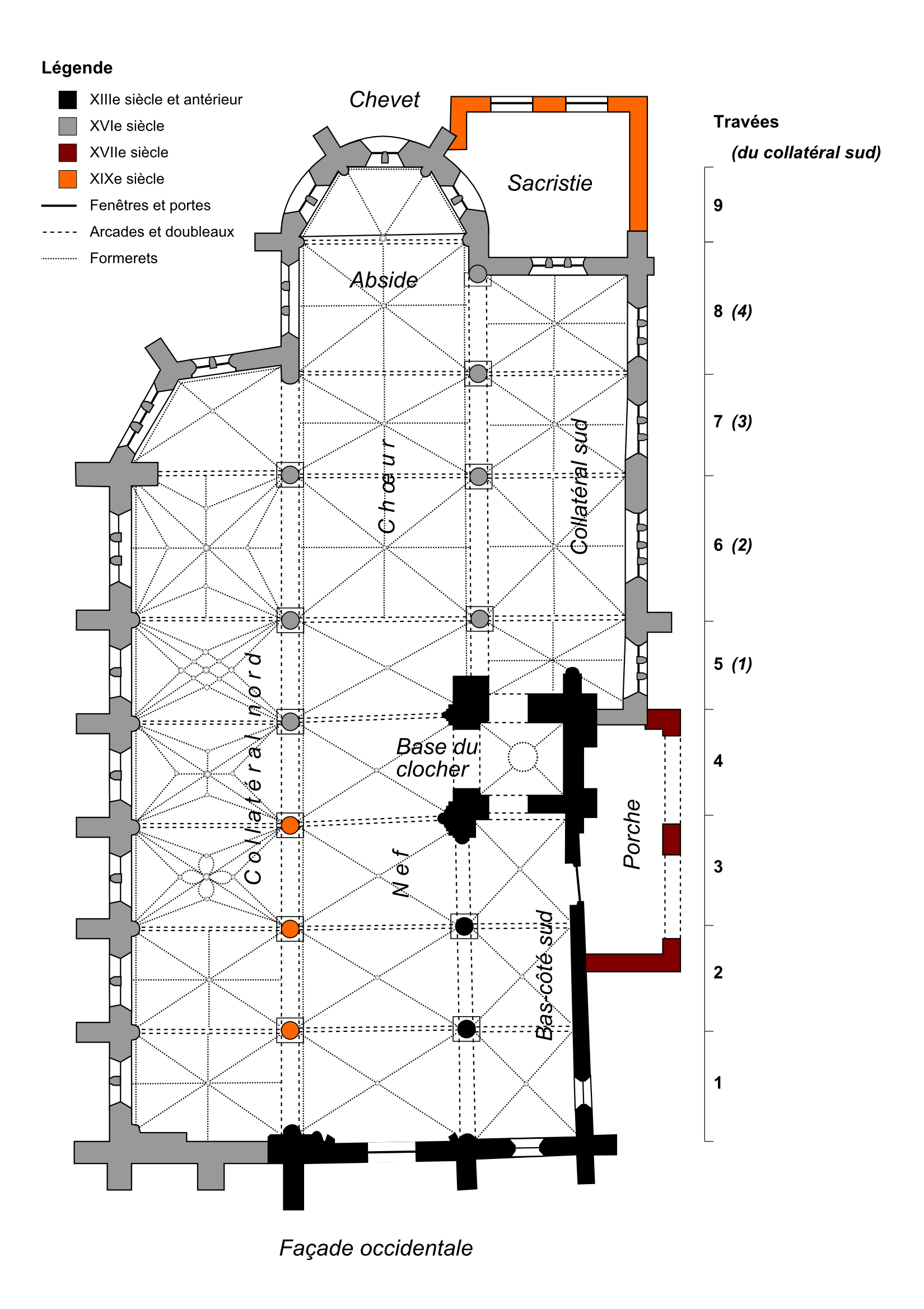 Plan des masses de l'église Saint-Denis de Groslay, avec le dessin des voûtes et les périodes de construction des murs et piliers.